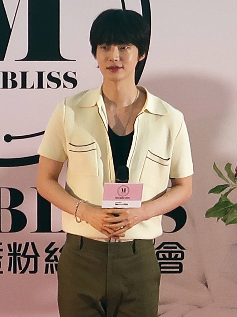 안재현